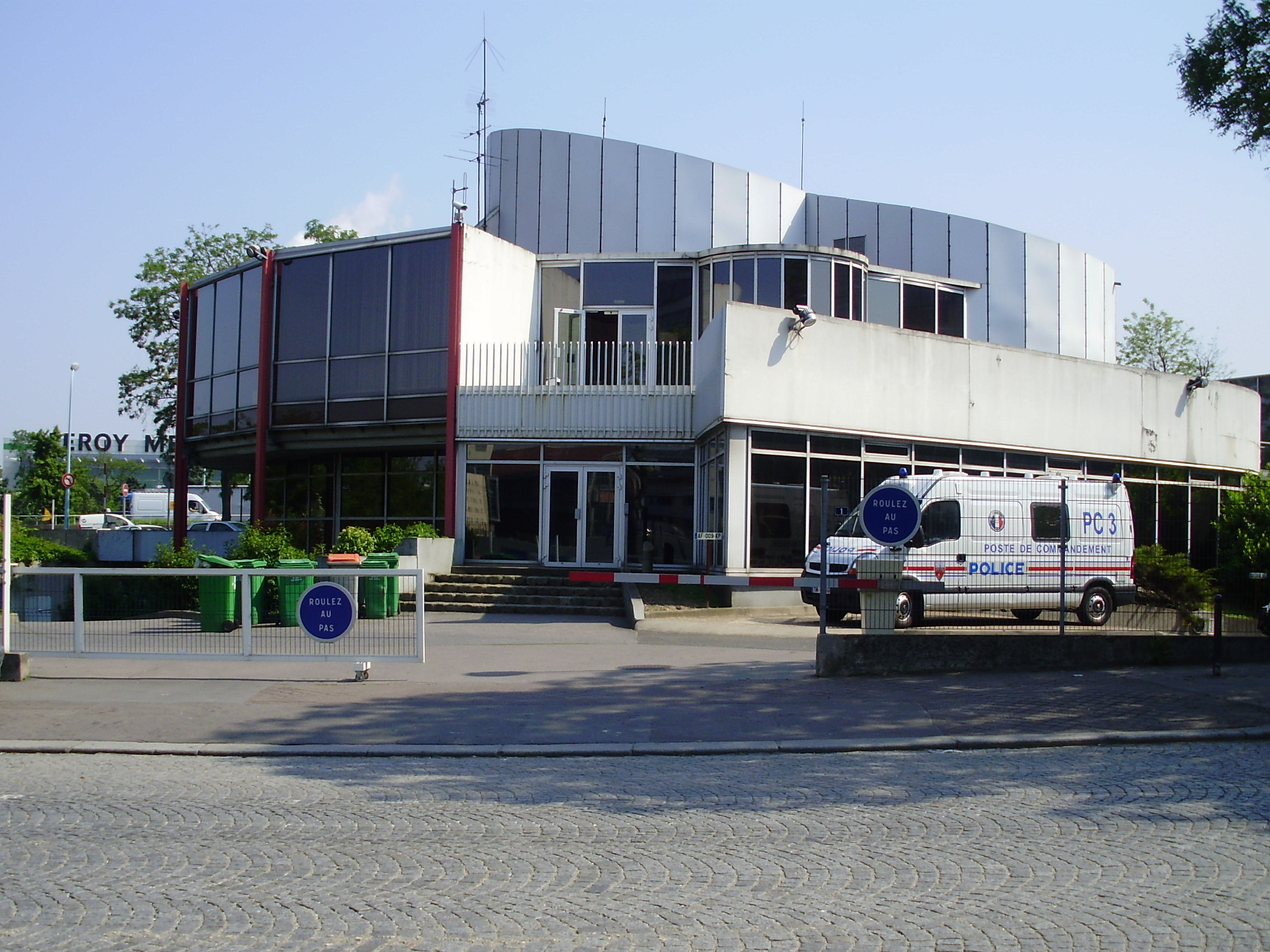 Poste d'exploitation Berlier, pour la surveillance du boulevard périphérique de Paris, en France, au 1 rue Jean-Baptiste-Berlier, dans le 13e arrondissement de Paris : vue d'ensemble depuis le trottoir nord de la rue.